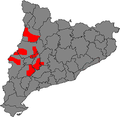 Àrea de la Denominació d'Origen Costers del Segre